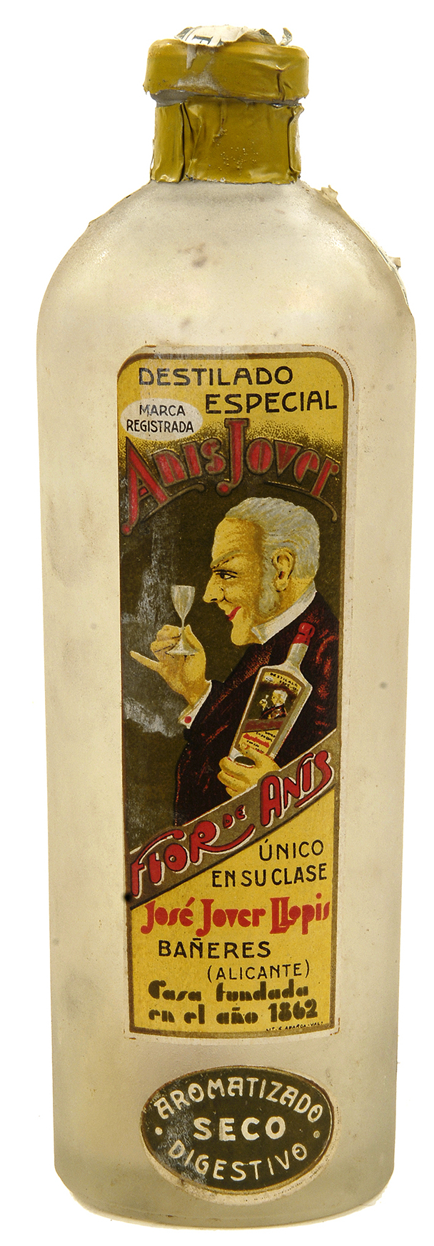 Fotografies dels objectes de l'exposició permanent de la sala "Secà i Muntanya" del Museu Valencià d'Etnologia - Fotografies de Mateo Gamon.